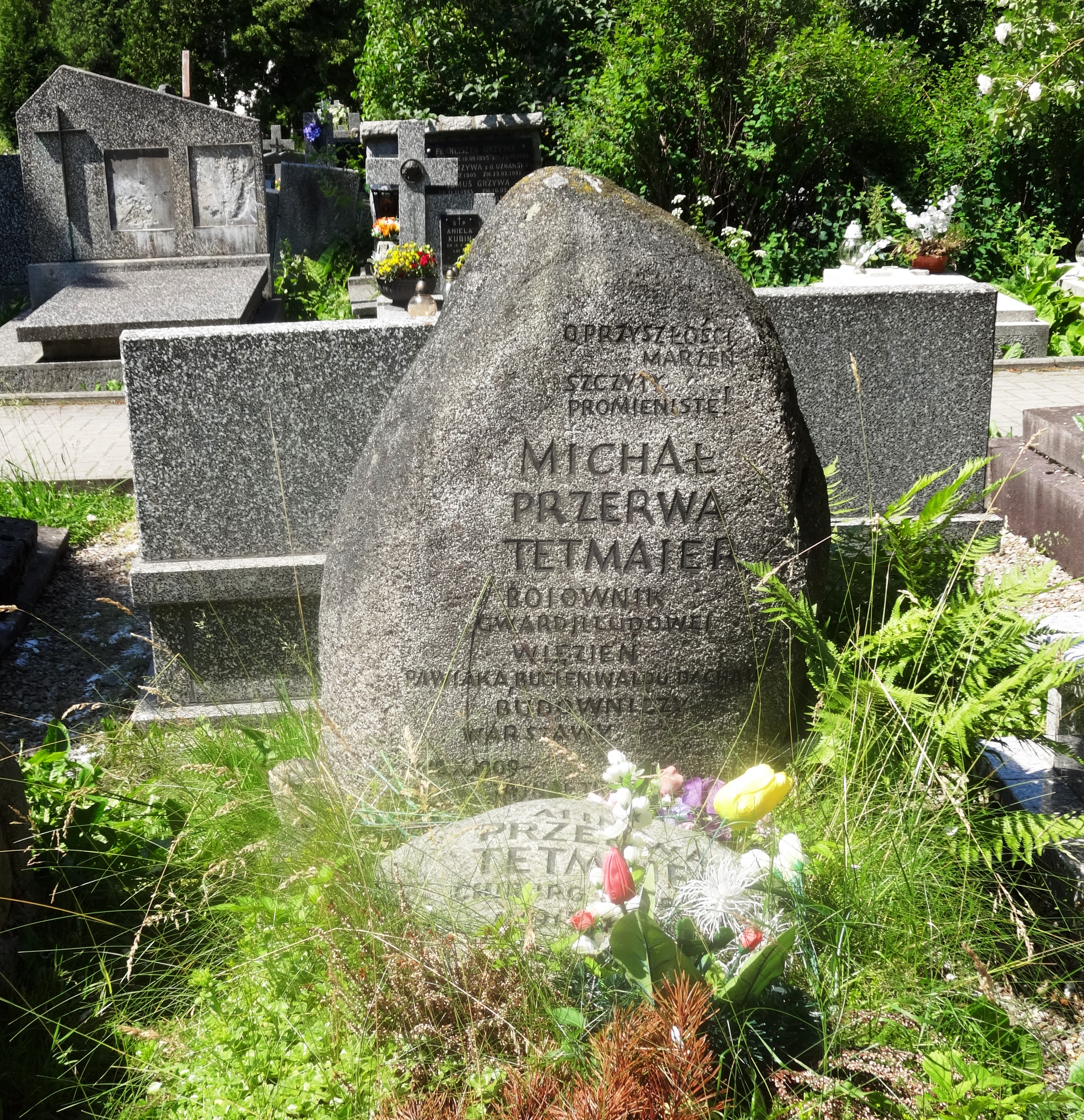 New Cemetery in Zakopane